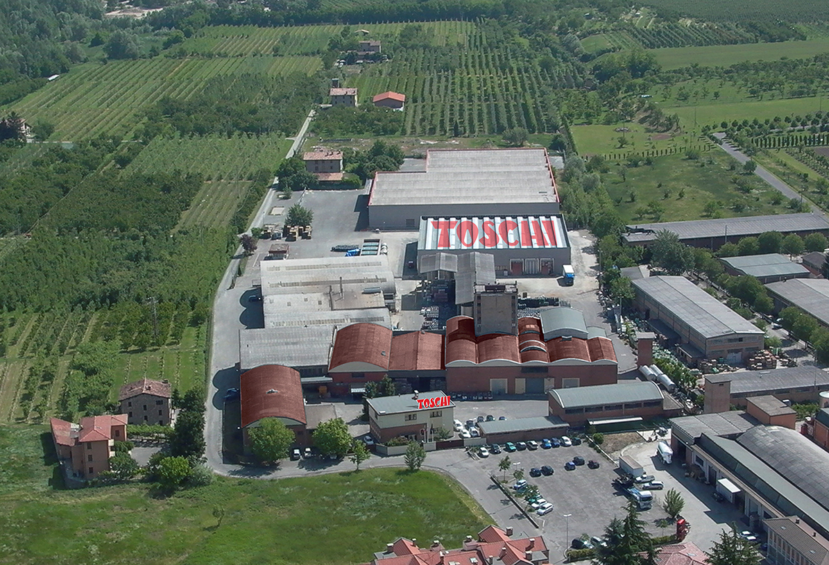 Veduta aerea Toschi Vignola